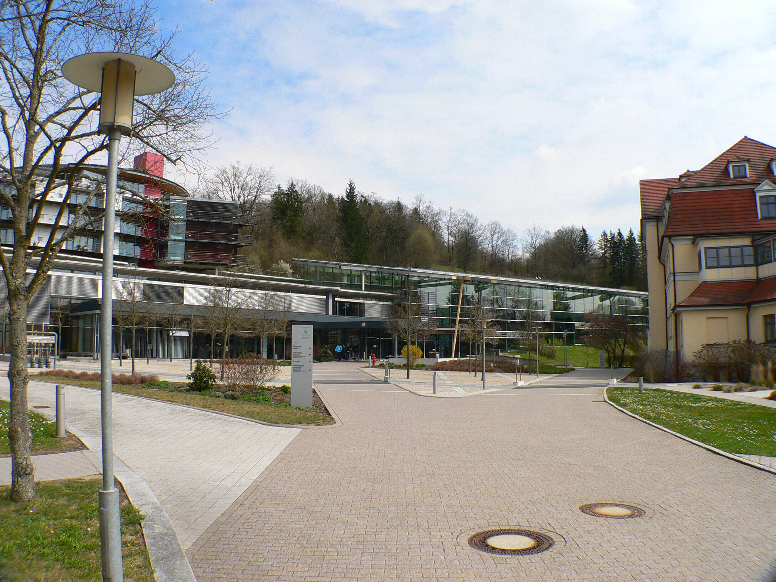 Terrassentherme in Bad Colberg, Thüringen, Deutschland